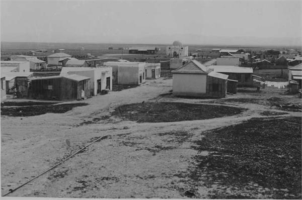 בלפוריה - מראה